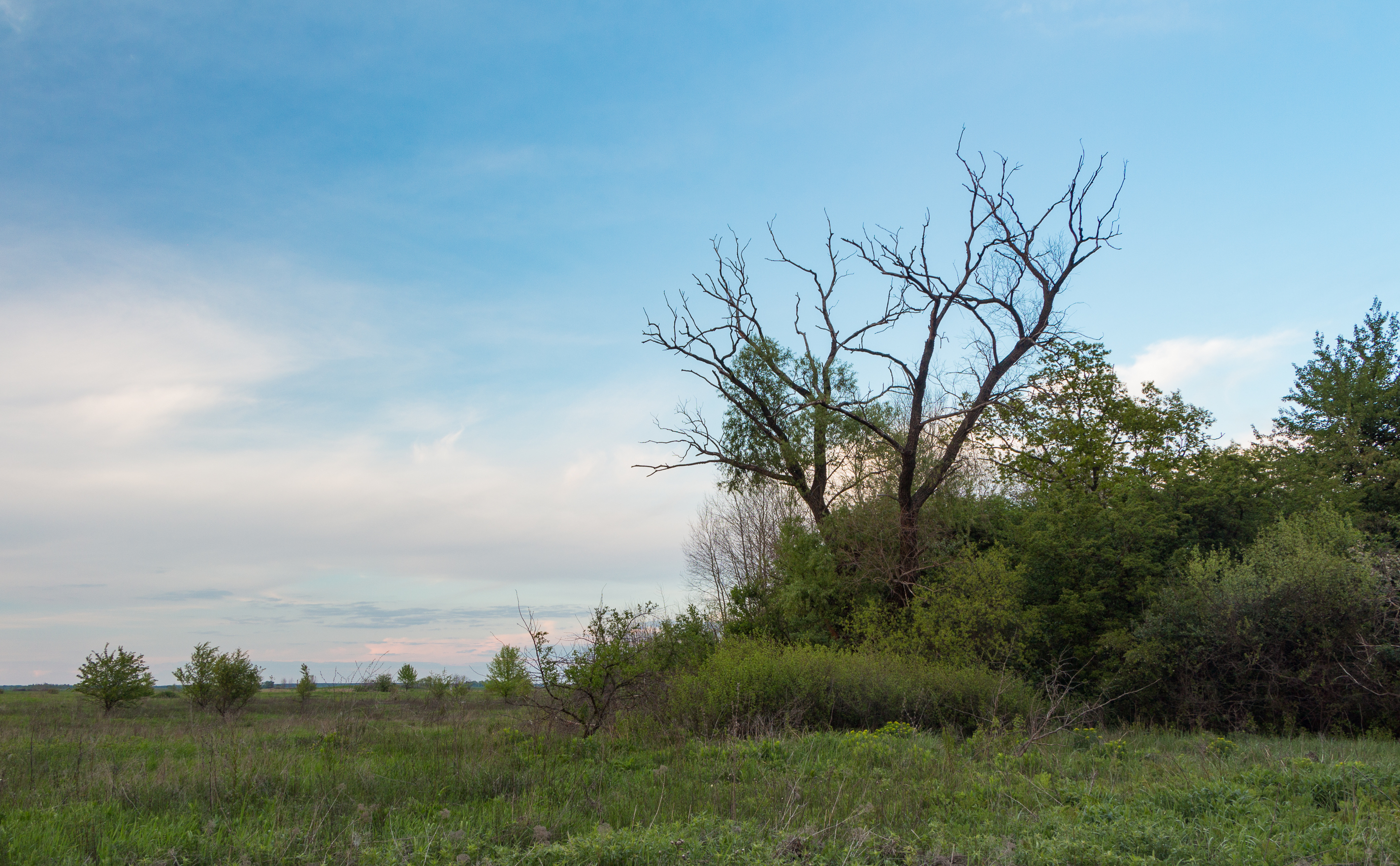 «Нечаївщина», Бориспільський район, Іванківська сільська рада